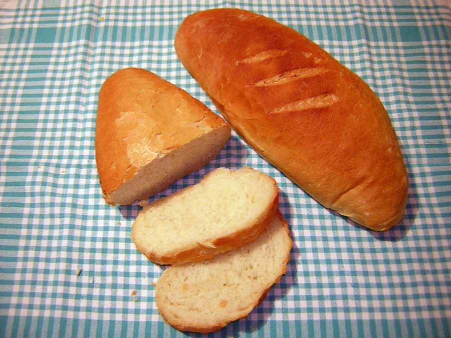 Serbian bread